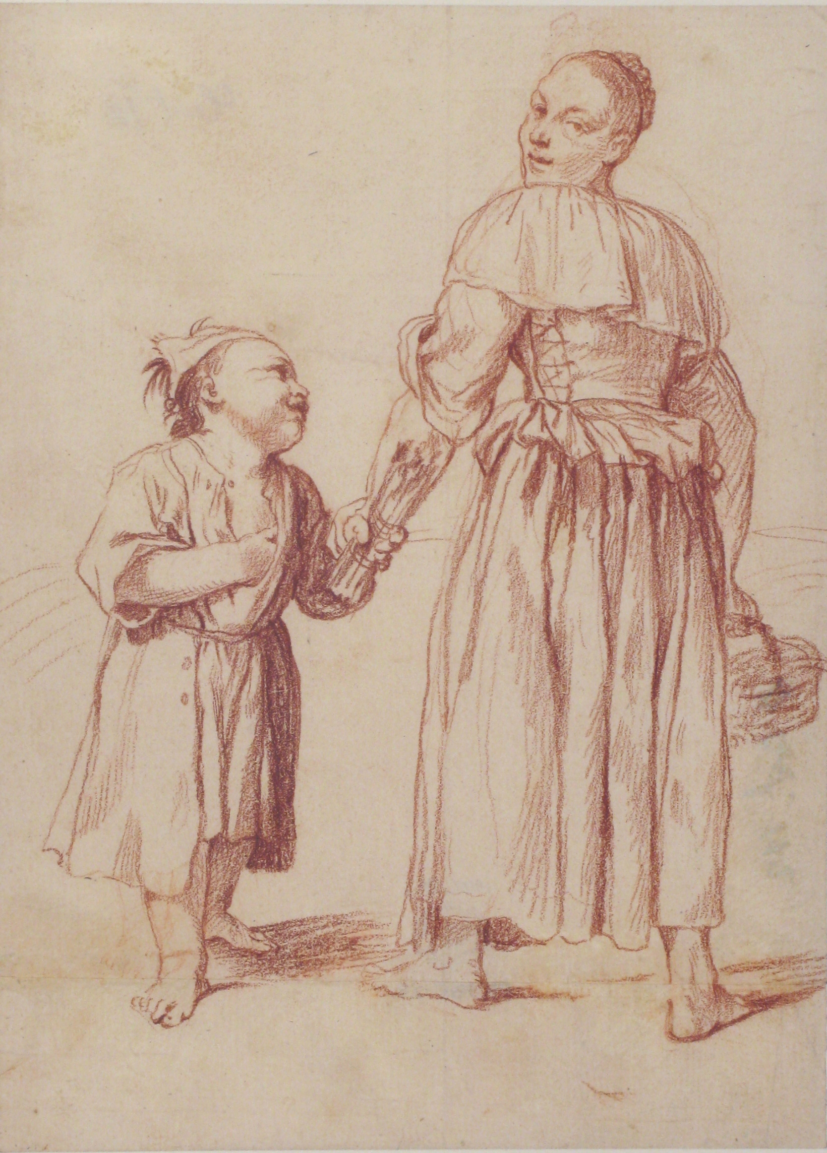 Drawing; Drawings